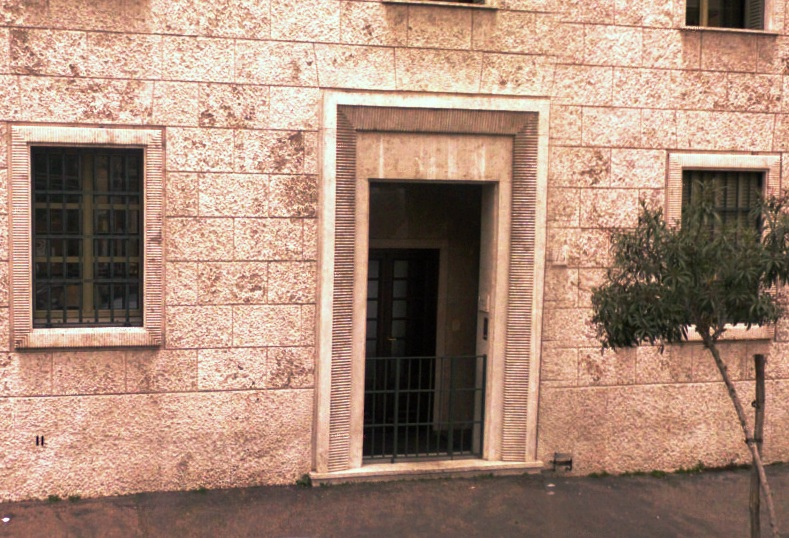 Opus Dein päämajan ja prelaattikirkon etuovi Romassa. Prelaattikirkossa on Josemaria Escriván Opus Dein perustajan hauta. Johannes Paavali II julisti Opus Dein perustaja pyhäksi vuonna 2002 Roomassa.